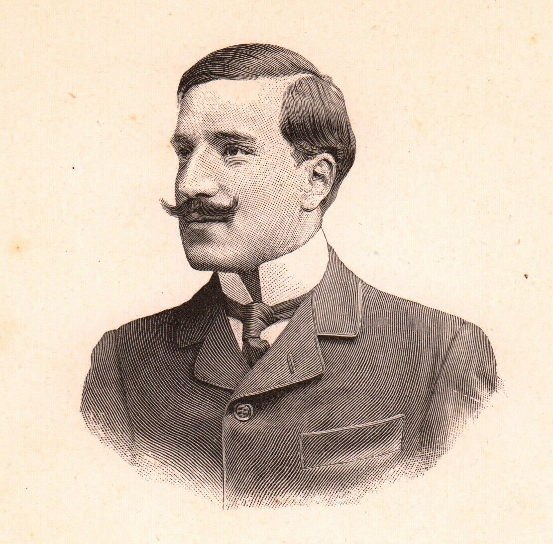 Italian/French painter, illustrator and poster artist Leonetto Cappiello (1875-1942)